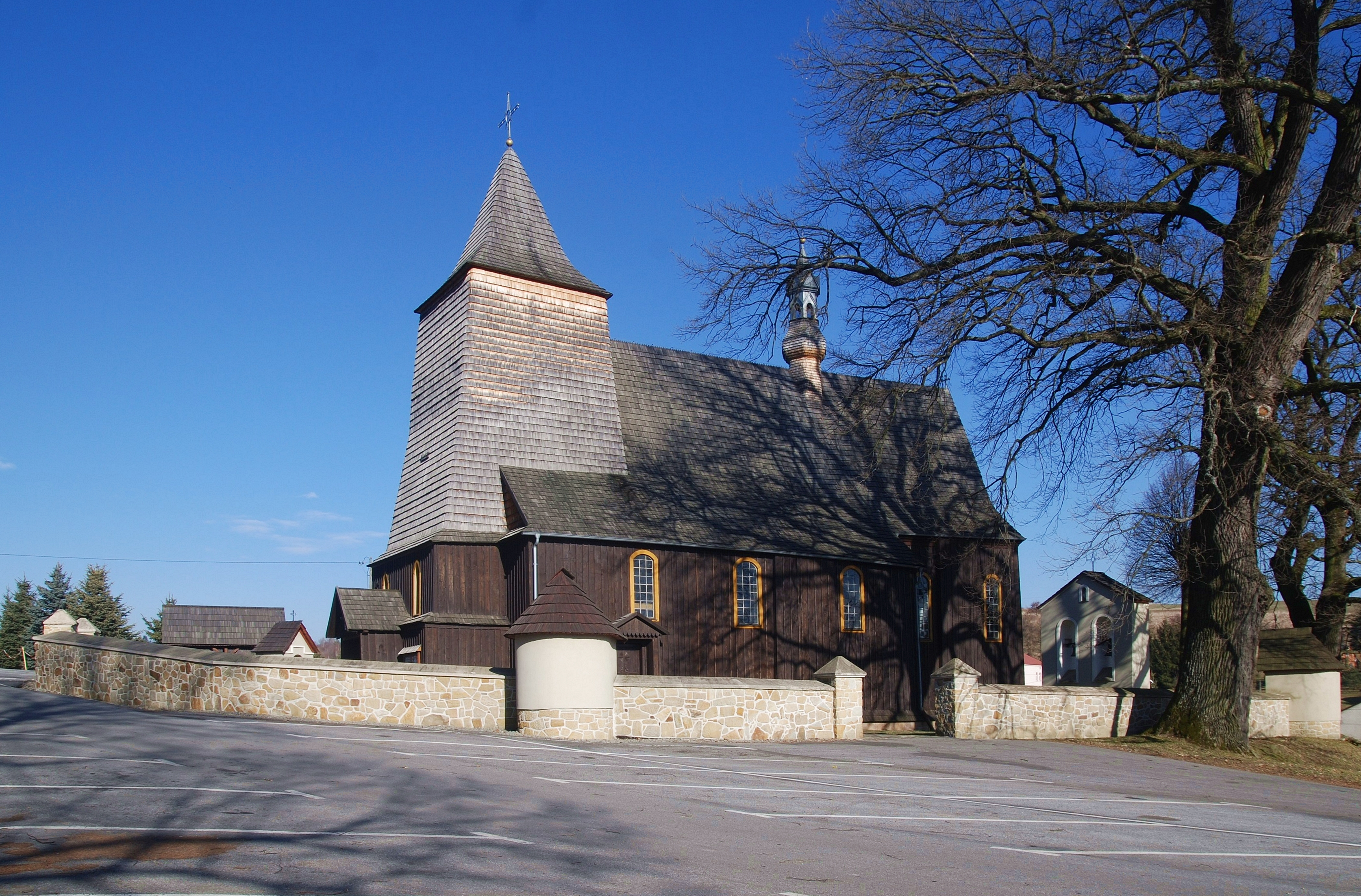 Czermna - rzymskokatolicki kościół pomocniczy pw. św. Marcina Biskupa, 1520, 1913